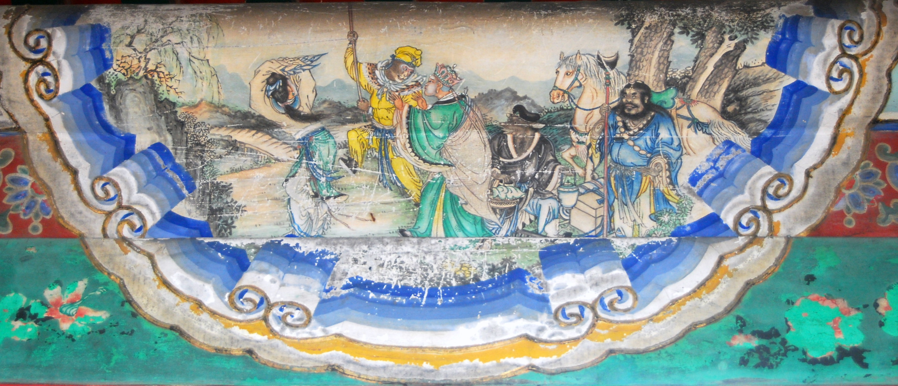 颐和园长廊上的彩绘：孙悟空三打白骨精